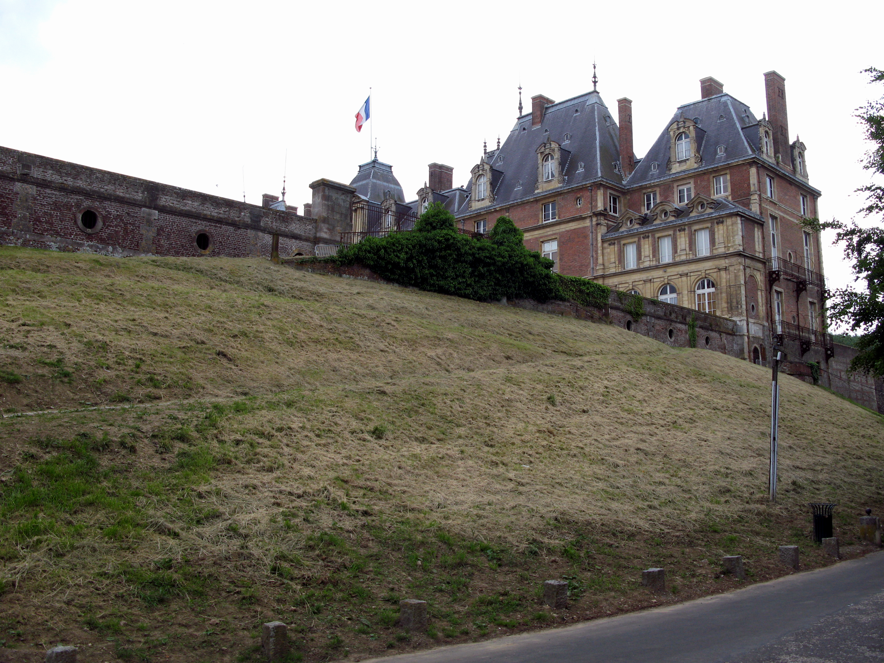 Eu (Seine-Maritime, France) - La rue des Fontaines longe de flanc Nord du château. On voit en direction de l'Ouest. .